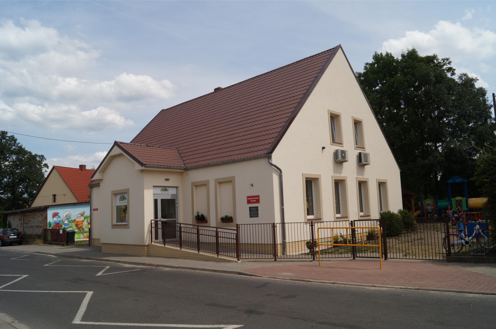 Przedszkole w Kłodawie